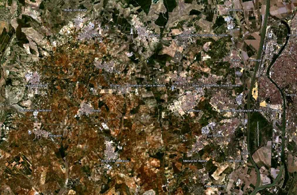 Substituye a imagen no libre (Aljarafe.png). Del satélite LandSat 7, a través de NASA World Wind. Copyright: Categoría:Mapas de España (imagen)